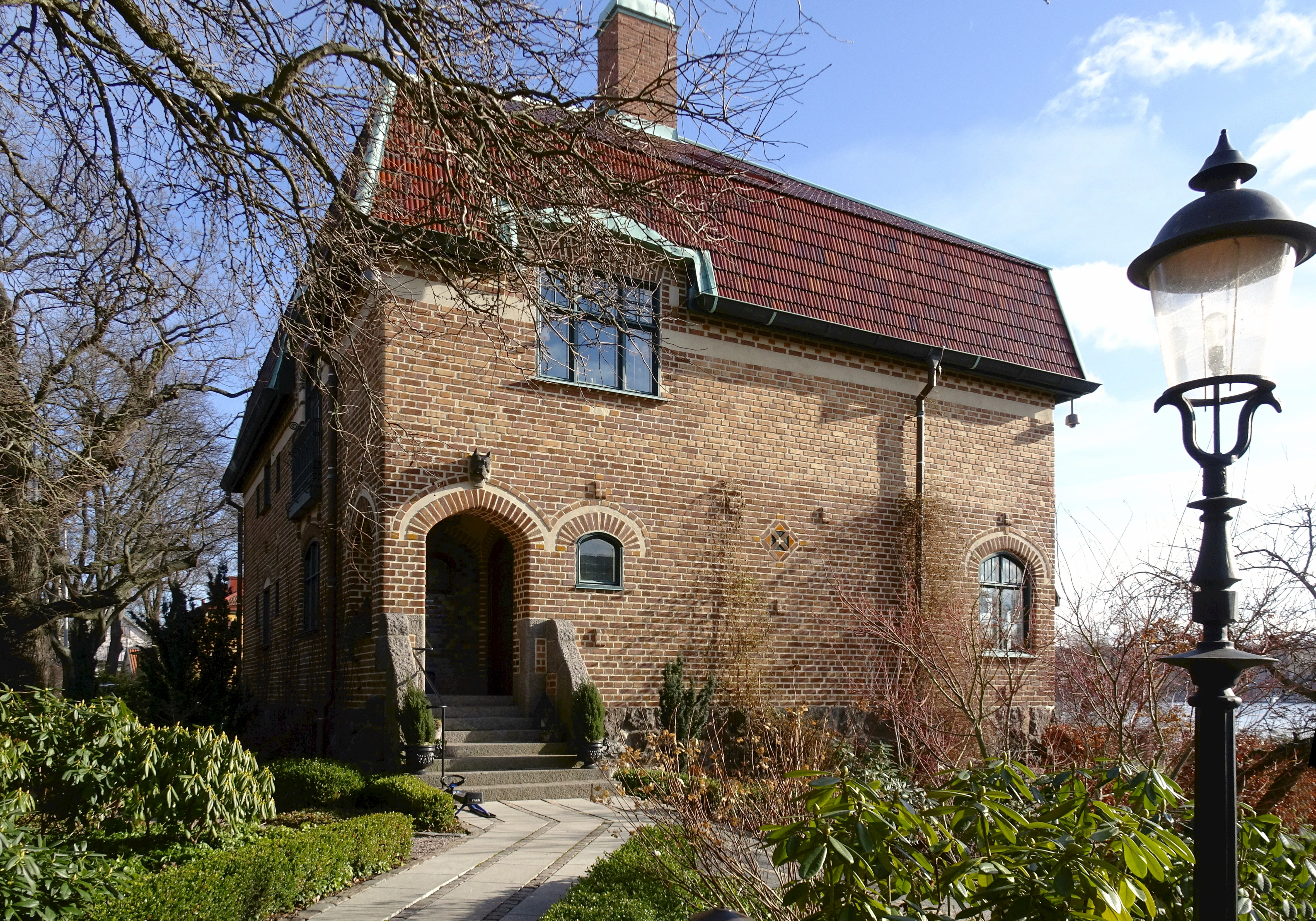 Villa Kåa,guldsmeden Karl Andersons villa på Djurgårdsvägen 114, arkitekt Erland Heurlin.